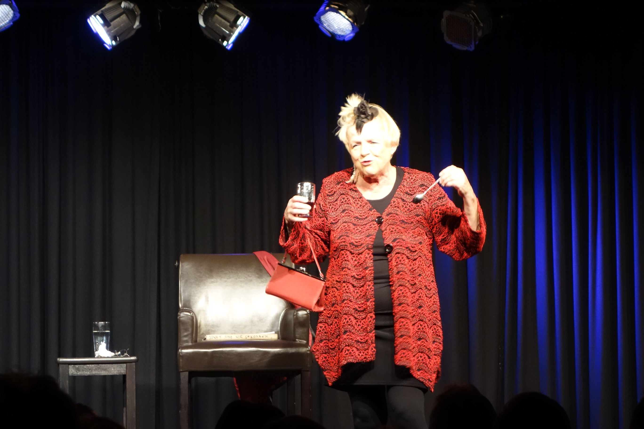 Gisela Oechelhaeuser im Q24 in Pirna